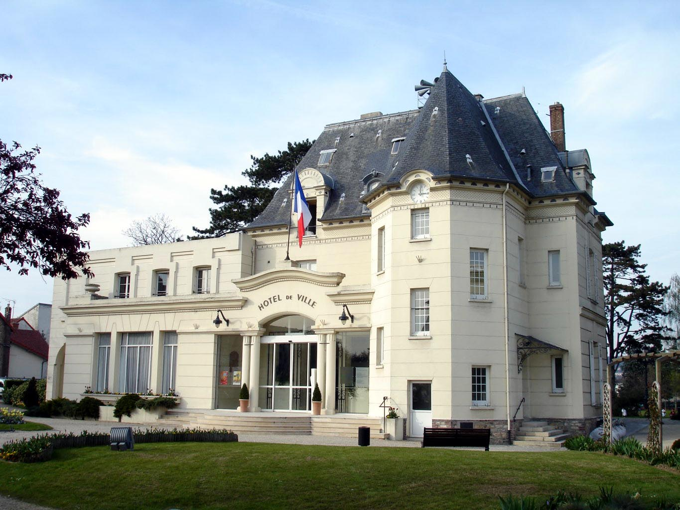 Hôtel-de-Ville d'Ermont (Val-d'Oise), France